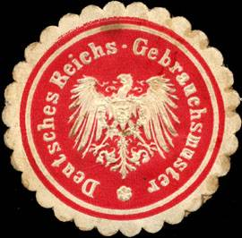 Sealing stamp Title: Deutsches Reichs - Gebrauchsmuster Description: rot, weiss, geprägt Place: size: 4 cm